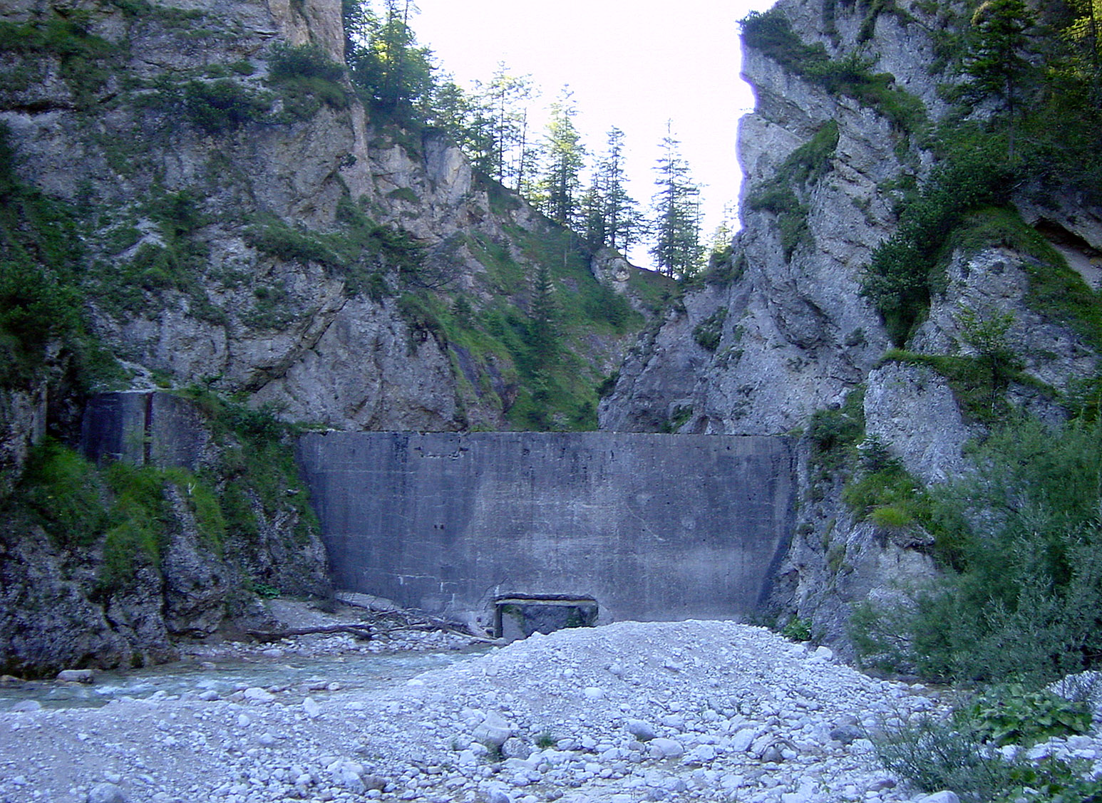 Haupttrift-Klause im Kaisertal